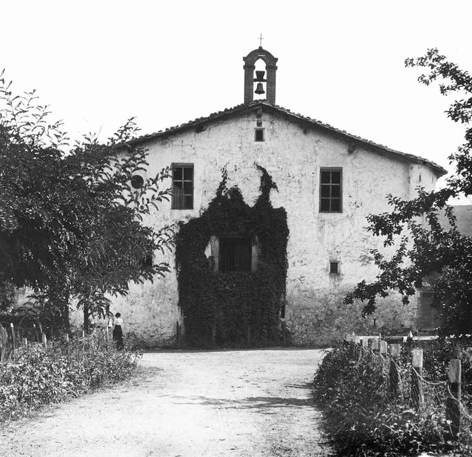 Masia de Verntallat al Mallol. Josep Salvany i Blanch (1912)